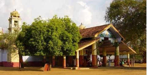 மருதடி விநாயகர் ஆலயமுன்னைய தோற்றம்